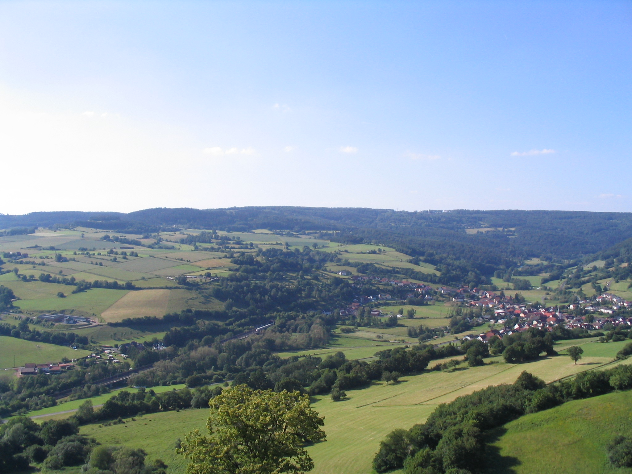 Blick von der Burg Schwarzenfels in das Sinntal mit dem Ort Weichersbach und dem Südportal des Landrückentunnels. Im Hintergrund der Höhenzug "Breite First" (550 m)